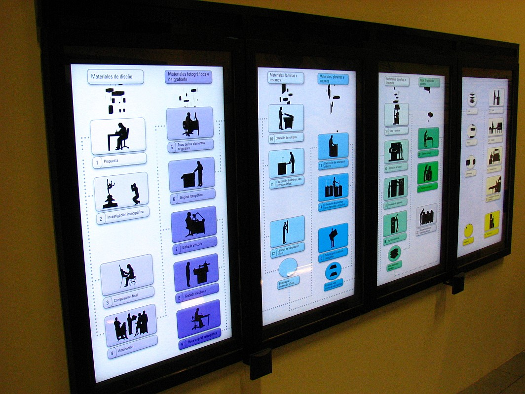 Las pantallas interactivas en el MIDE son una muestra de tecnología empleada en el museo.